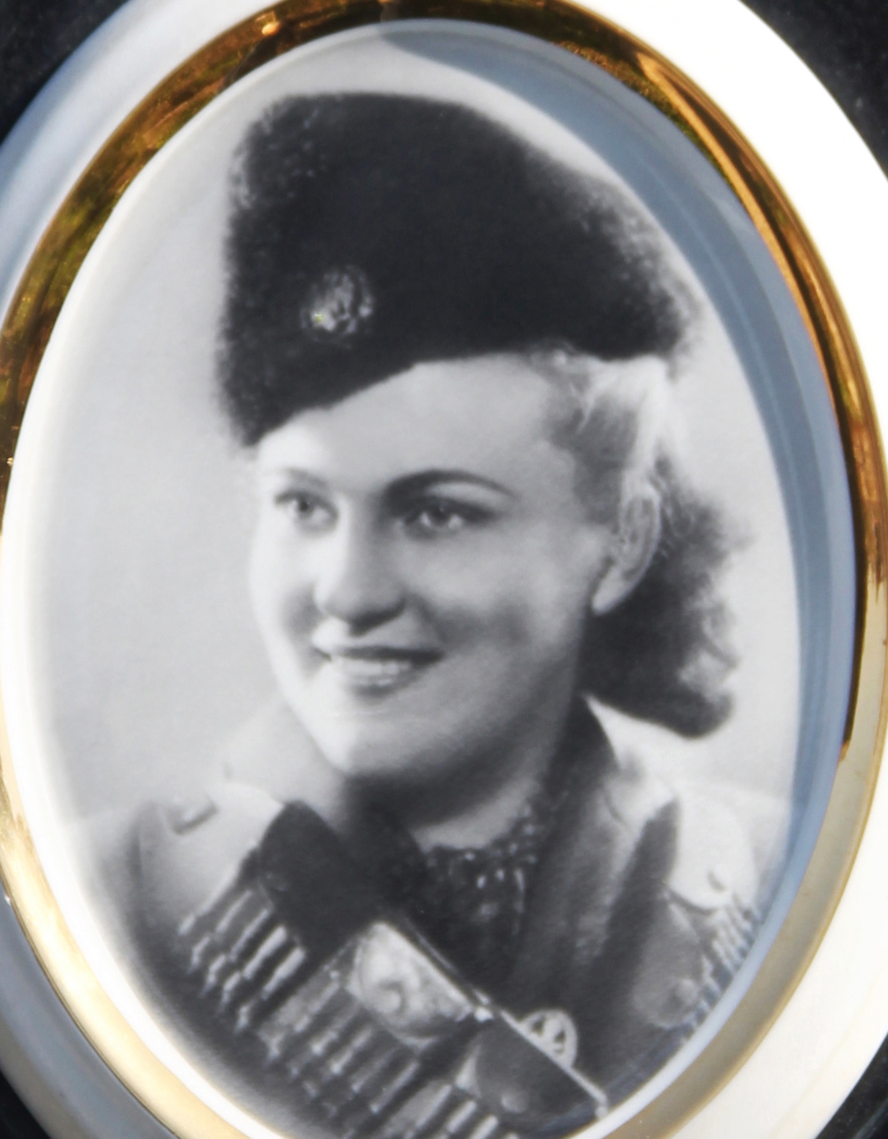 Bresnica